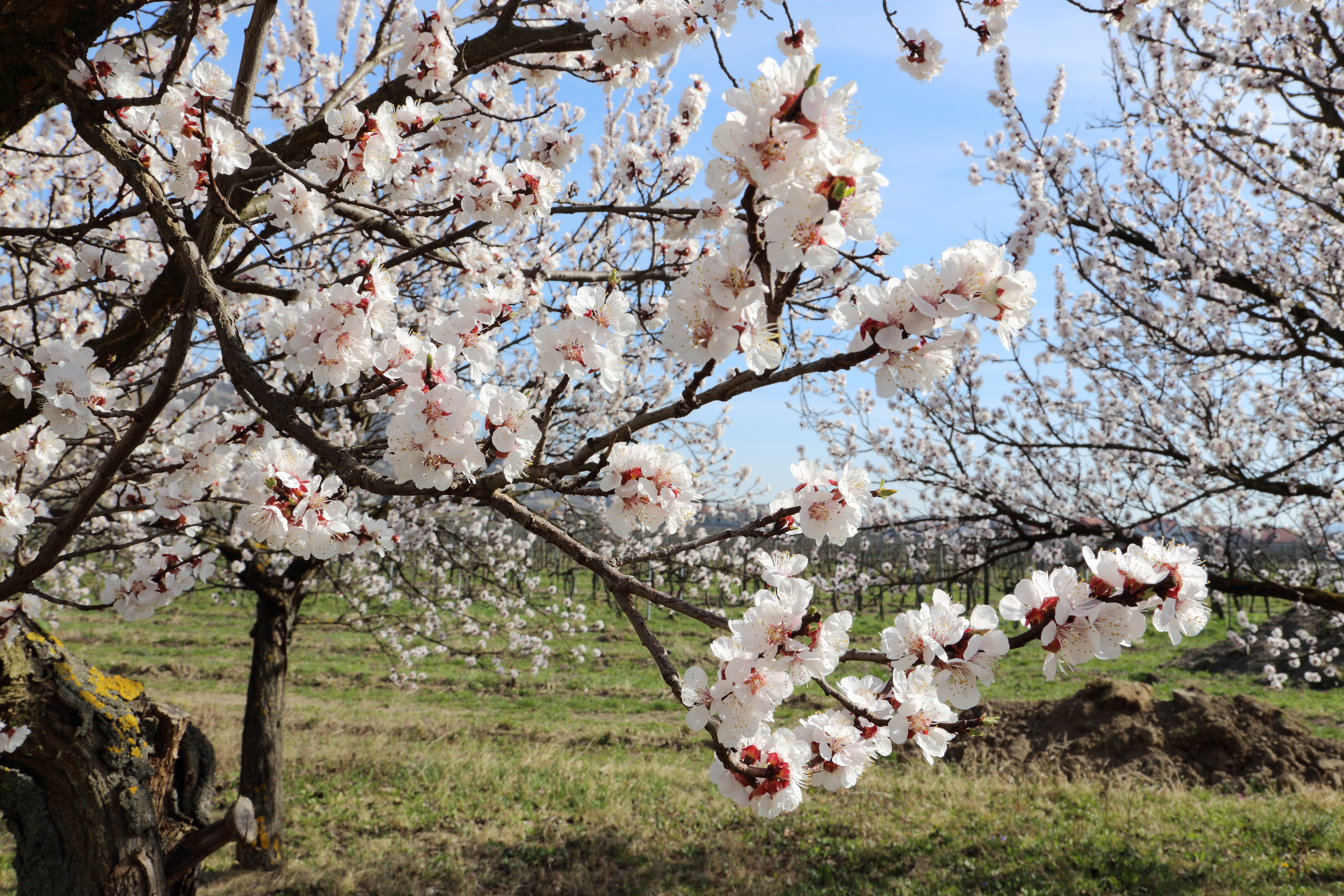 Aprikosenblüten bzw. Marillenblüten. Fotografiert in Oberloiben, ein Ortsteil der niederösterreichischen Stadt Dürnstein.